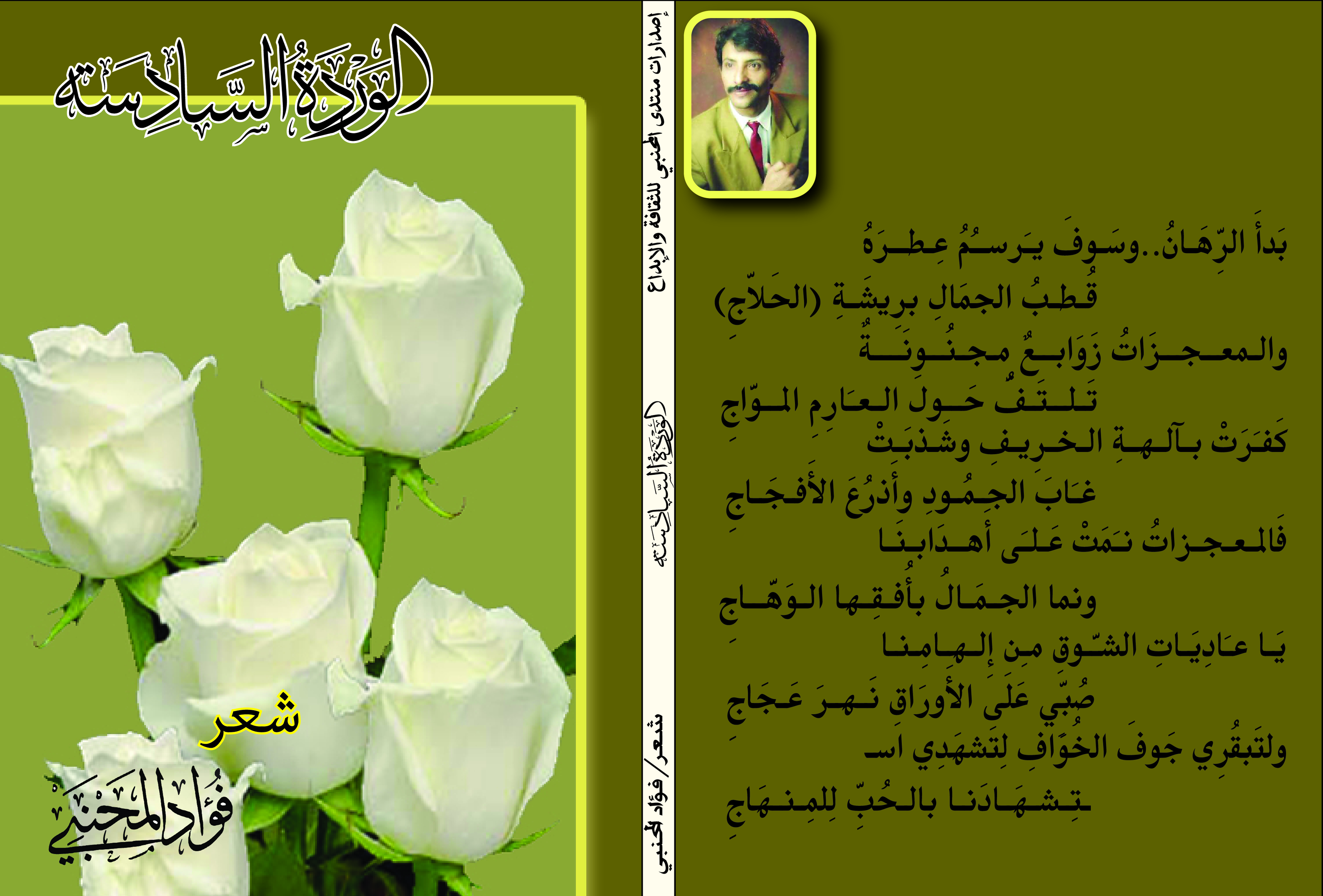 الوردة السادسة "ديوان شعري للشاعر فؤاد المحنبي"